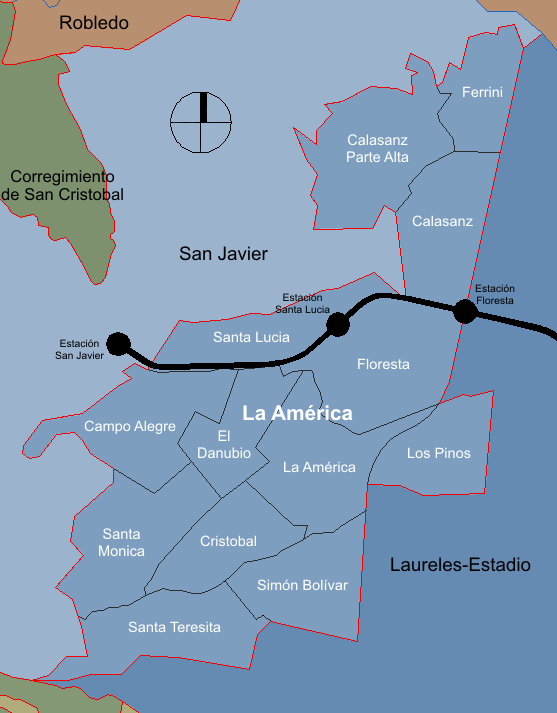 mapa de la división barrial de la comuna La América. Medellín, Colombia.